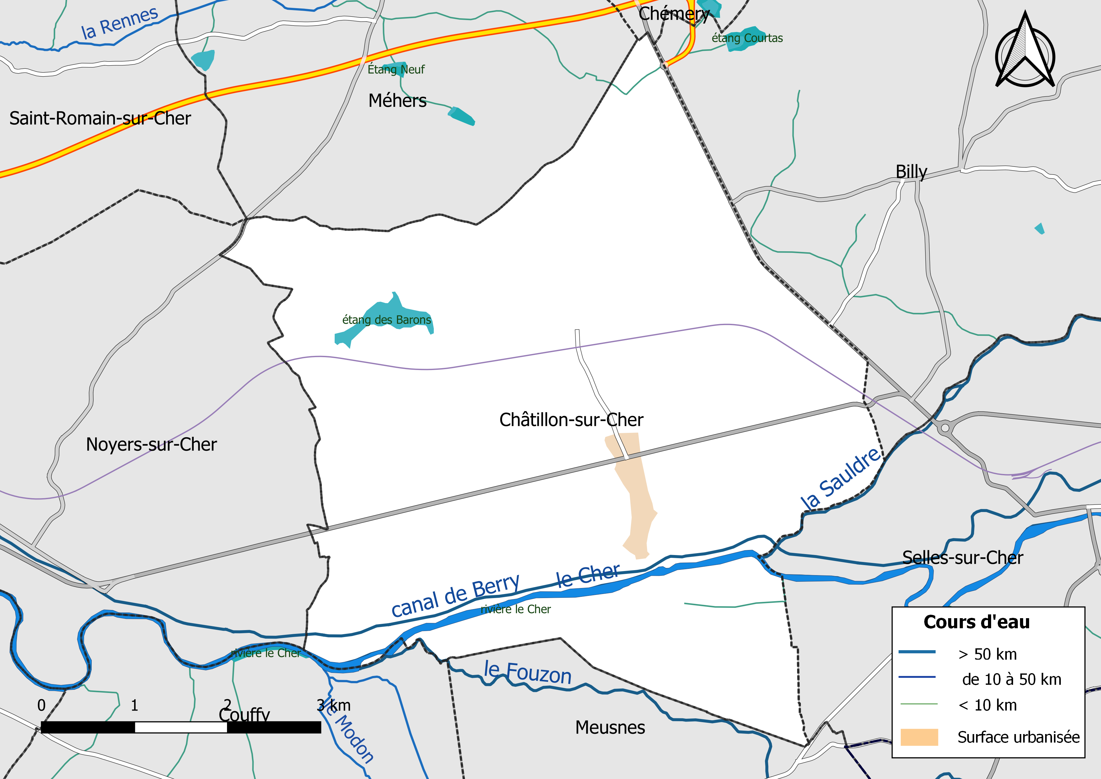 Carte du réseau hydrographique de la commune de Brévainville (Loir-et-Cher, France).